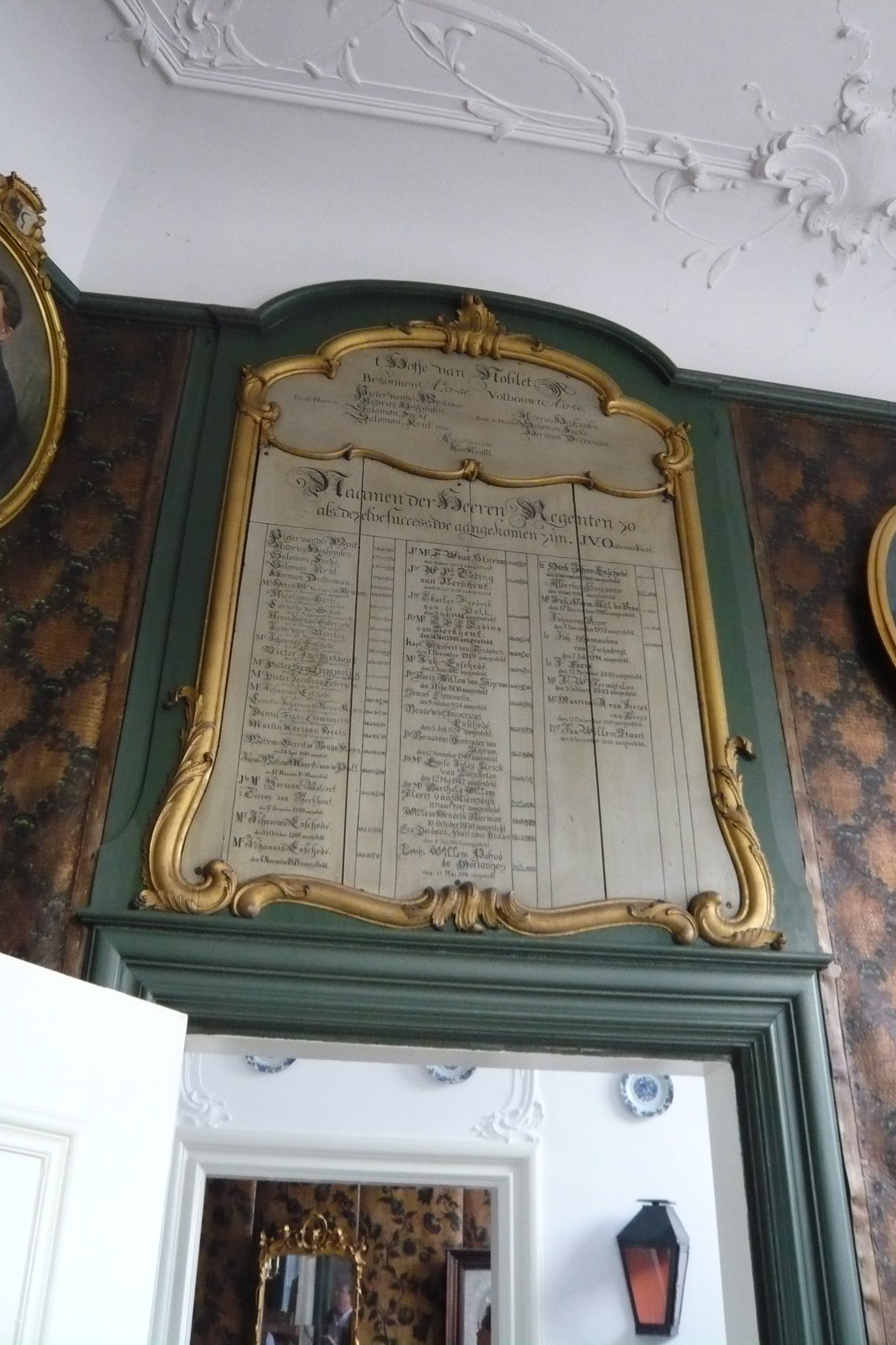 Hofje van Noblet, Haarlem